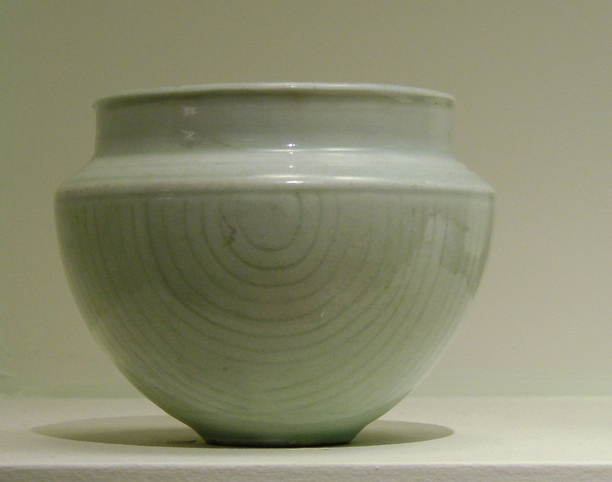 Petite jarre, porcelaine blanche à couverte blanc bleuté "qinbai". Chine du Sud, Jiangxi, Jingdezhen, Dynastie des Song du Nord, 11ème-12ème siècle. Musée Guimet, Paris.